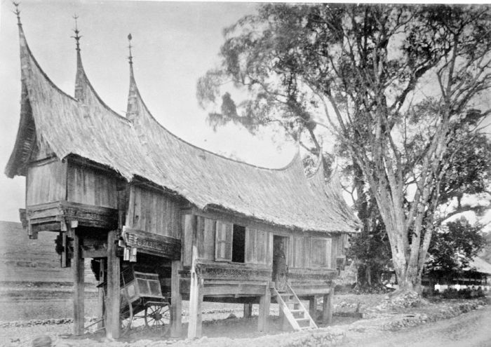 Foto. Deze foto is gemaakt tijdens de Sumatra Expeditie van 1877-1879. Landschappen uit de Padangsche Bovenlanden.. Een balei te Alahanpandjang